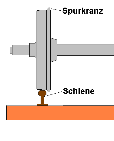 Spurkranz Eisenbahnrad